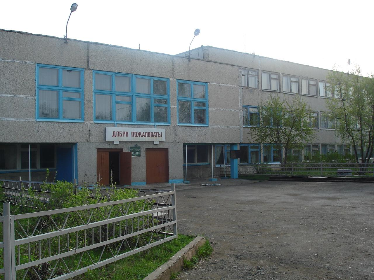 Школа в селе Сажино